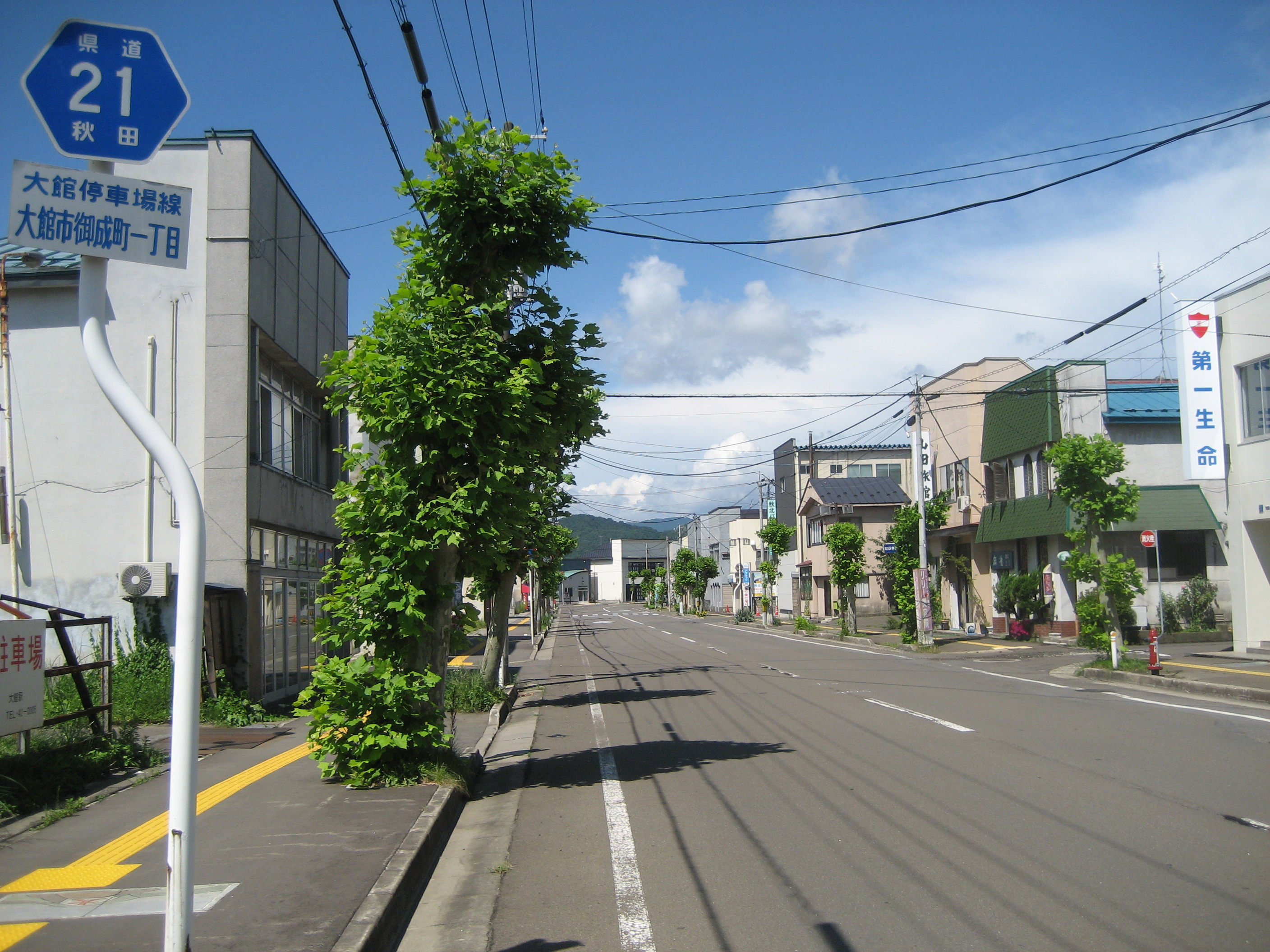 秋田県道2号線大館市御成町1丁目付近（大館駅方向を撮影）